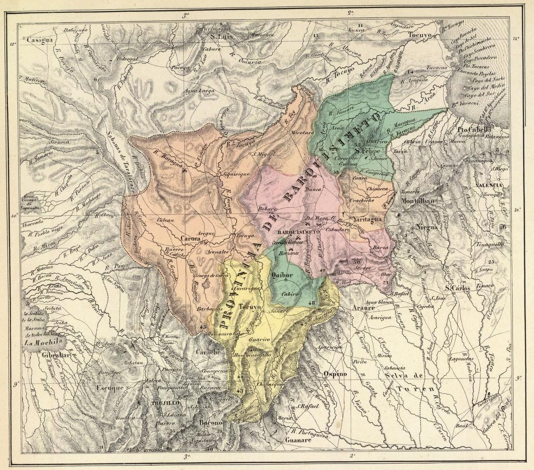 Provincia de Barquisimeto. Tomado del "Atlas físico y político de la República de Venezuela", 1840.